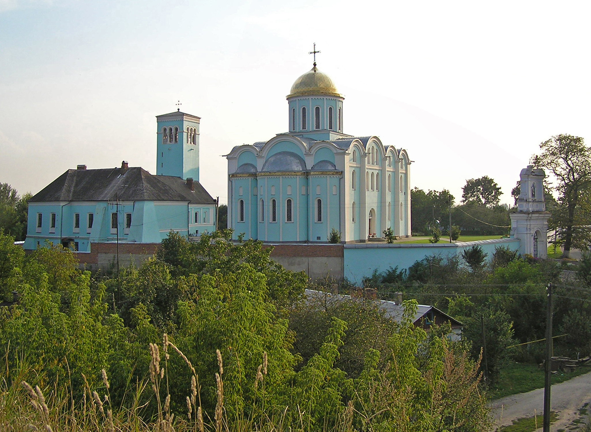 Комплекс Успенського собору, вул. Соборна, м.Володимир-Волинський